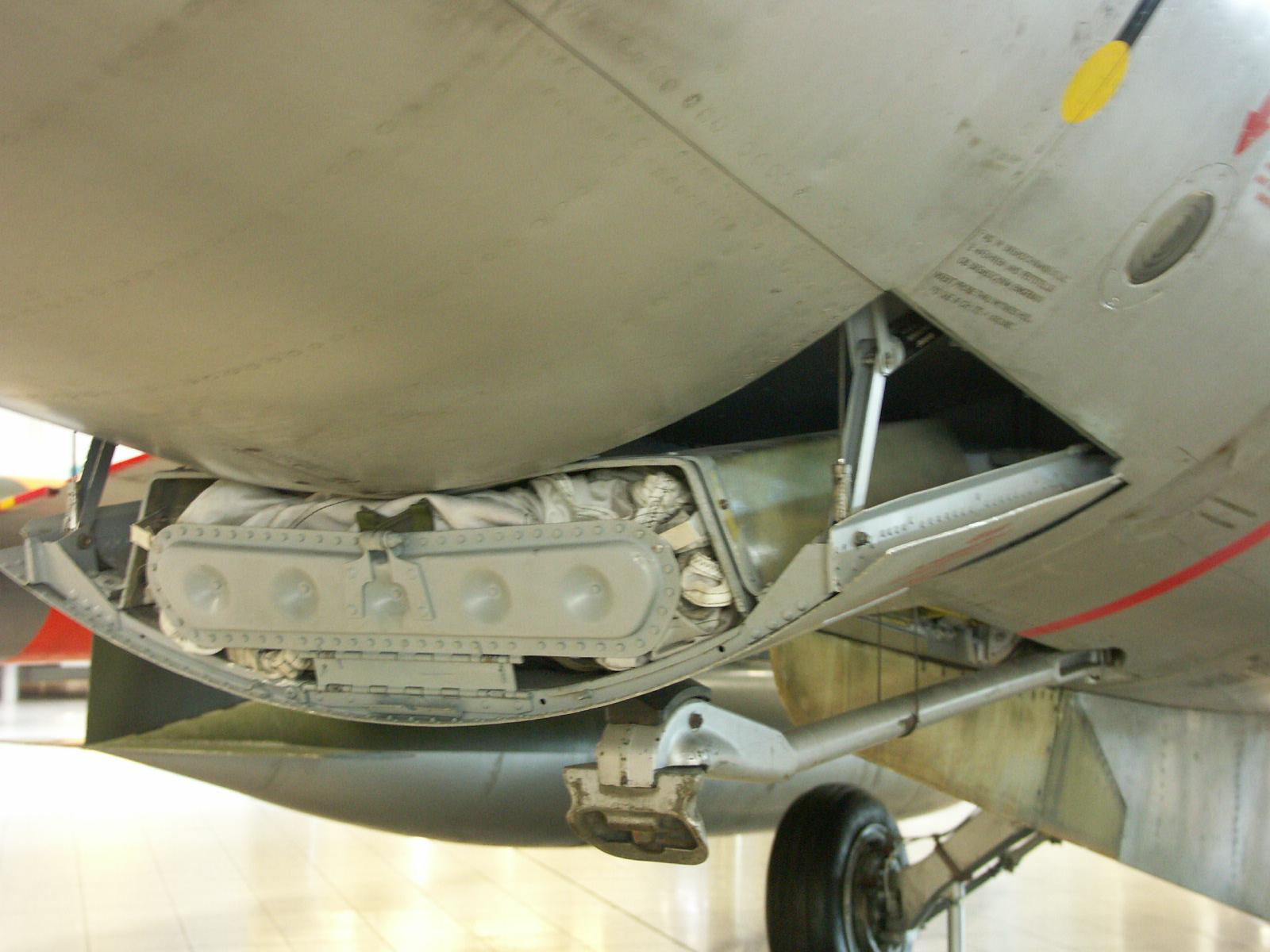 Deutsches Museum Munich Photo by Jean-Patrick Donzey